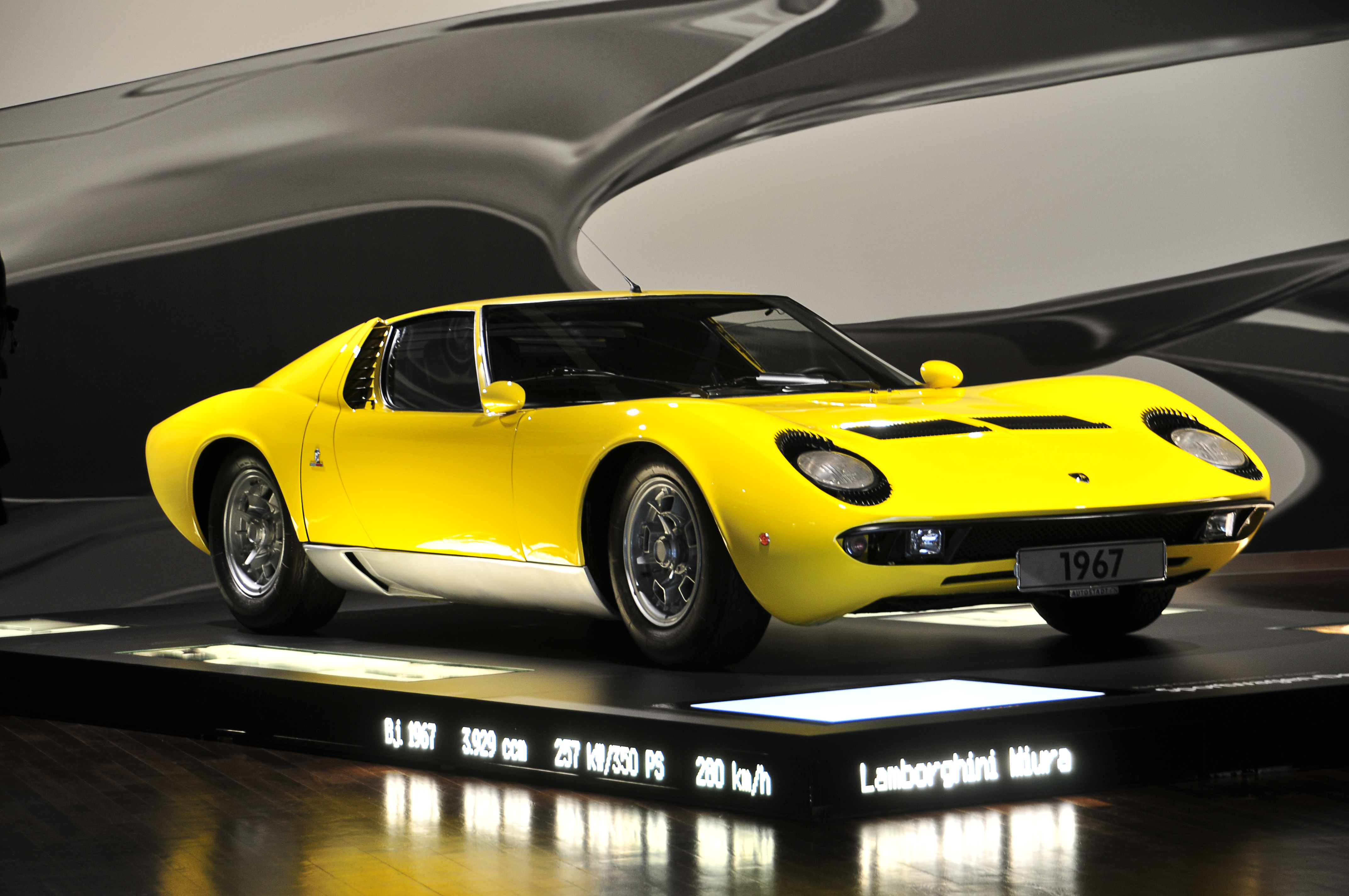 Fahrzeug in der Autostadt Wolfsburg; Lamborghini Miura